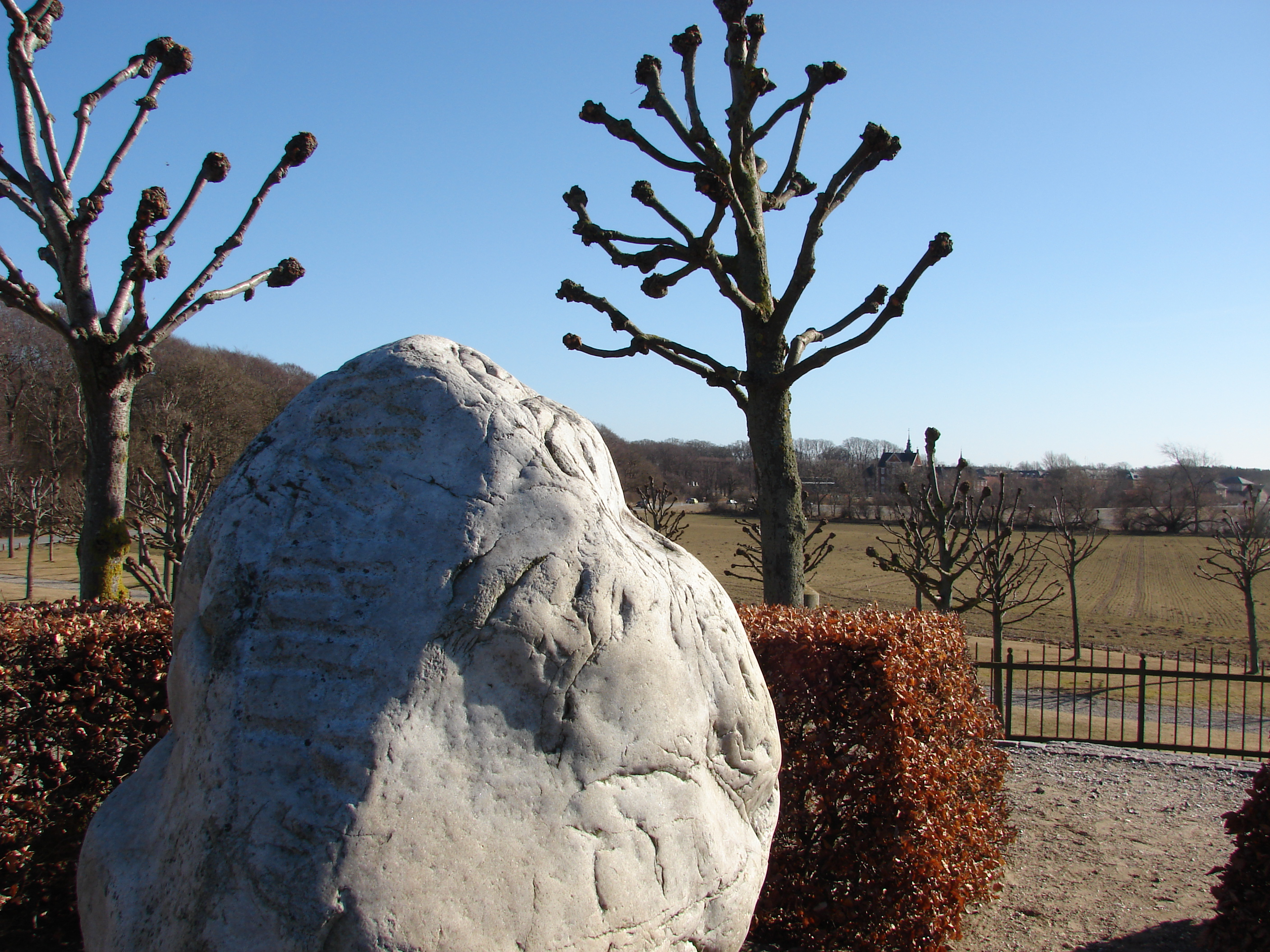 Sten med runer fra det 5. eller 6. århundrede; "Igijos sten" på toppen af Arveprins Frederiks rekonstruerede stenaldergrav tilegnet Juliane Marie af Danmark og Norge, stenen stammer fra Stenstad, Helgen i Telemark. Julianehøj, Jægerspris, Sjælland. Signum N KJ81.